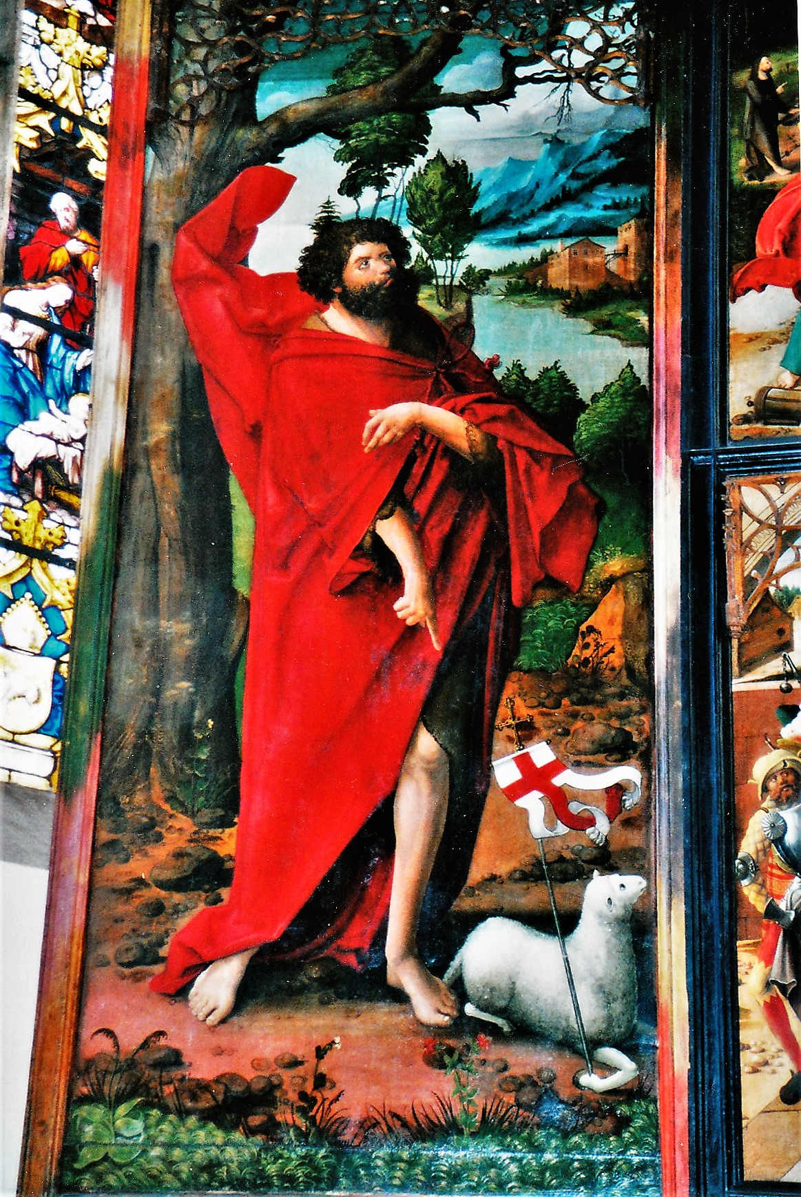 Schwabacher Altar - Passionsseite: Johannes der Täufer